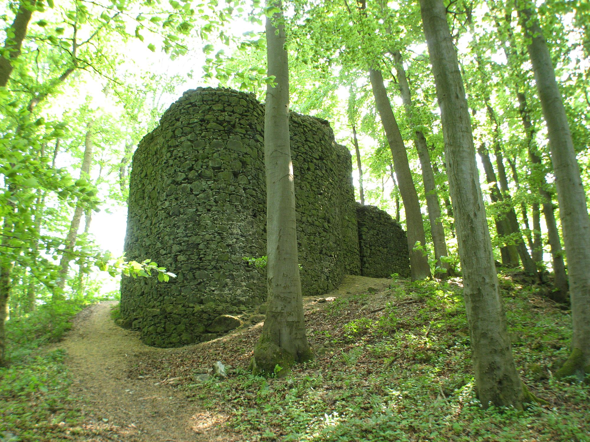 Reste des Hauptturm mit Rondell der Maienburg (Burg Eigenberg) bei Mengerskirchen Ortsteil Winkels